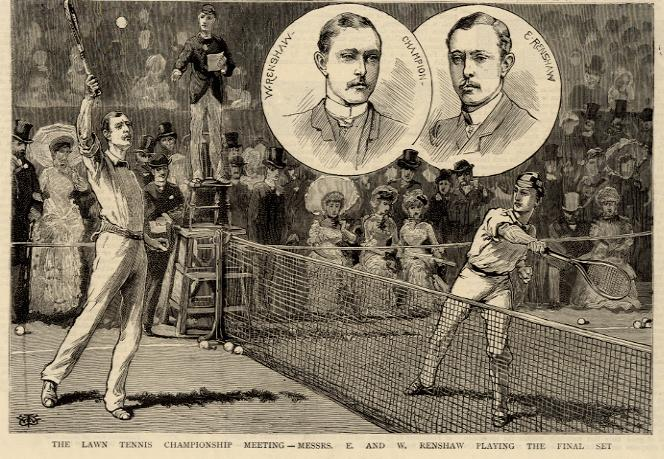 Wimbledonwinnaars Ernest Renshaw (1861-1899) + William Renshaw (1861-1904) op een ansichtkaart uit hun glorietijd